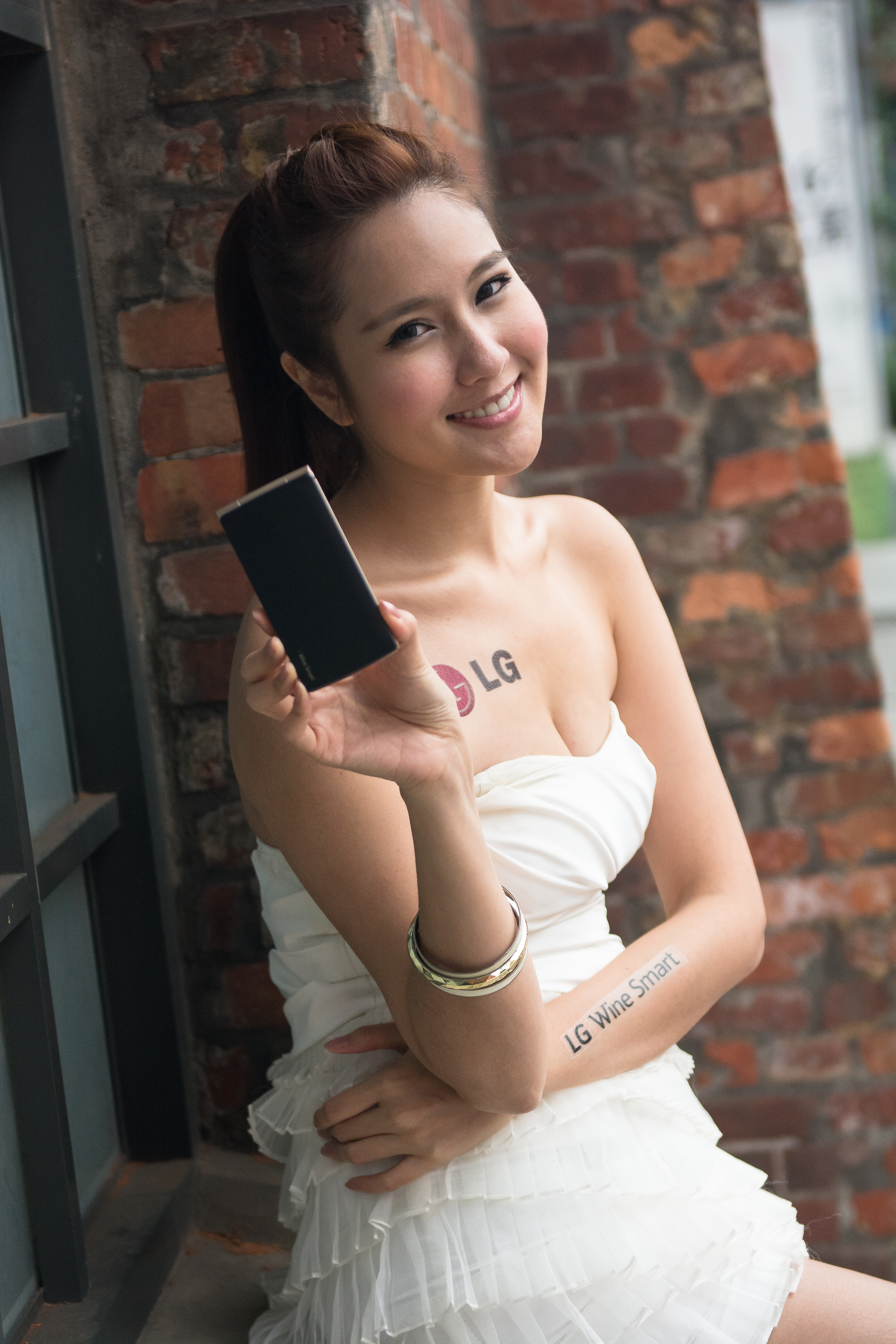 臺灣模特兒陳亮羽出席LG Wine Smart臺灣上市記者會。